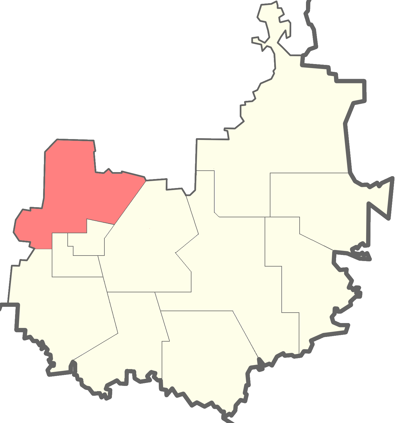 Великодвірське сільське поселення: Великодвірське сільське поселення на мапі Бокситогорського району